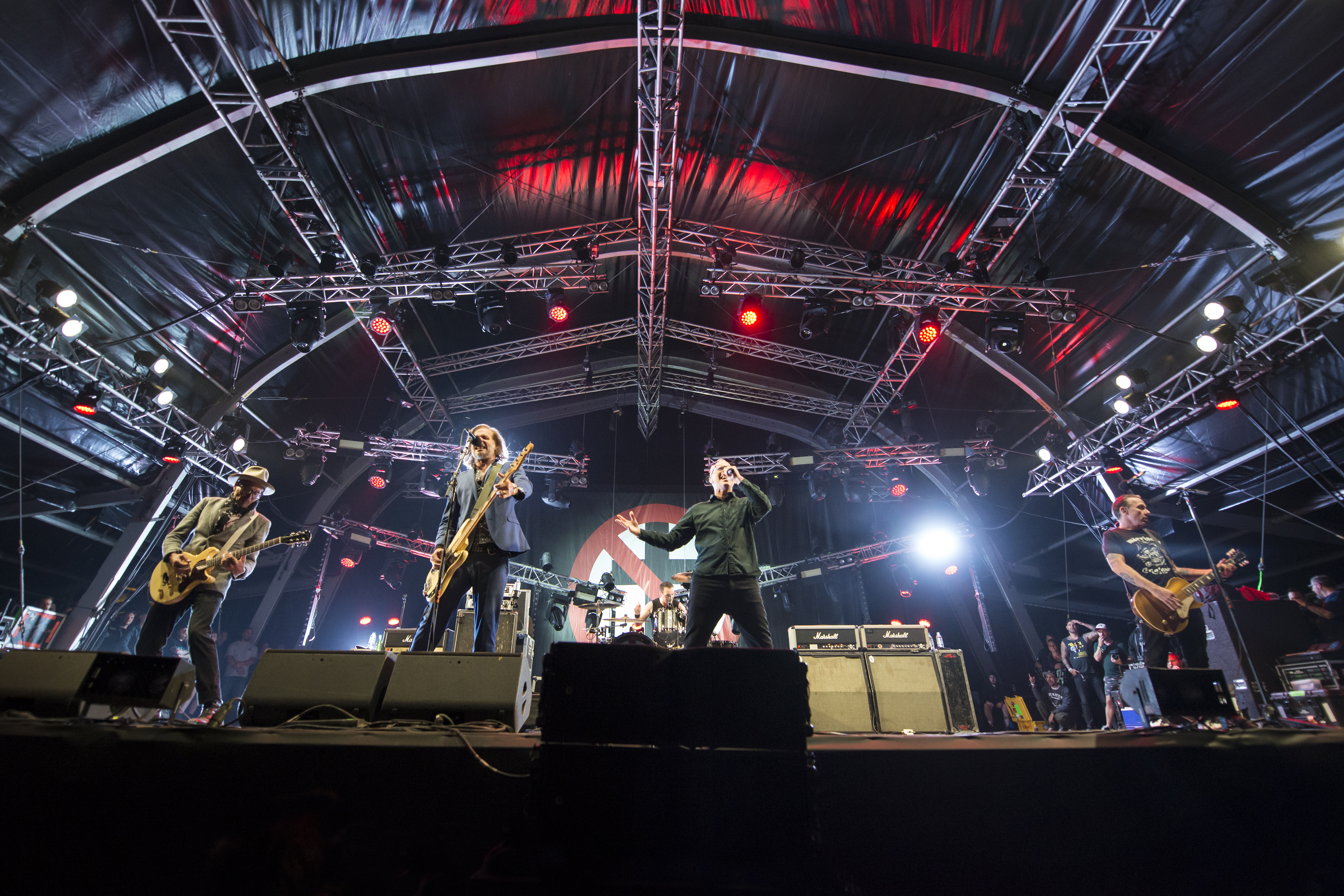 Bad Religion, Hellfest 2018.